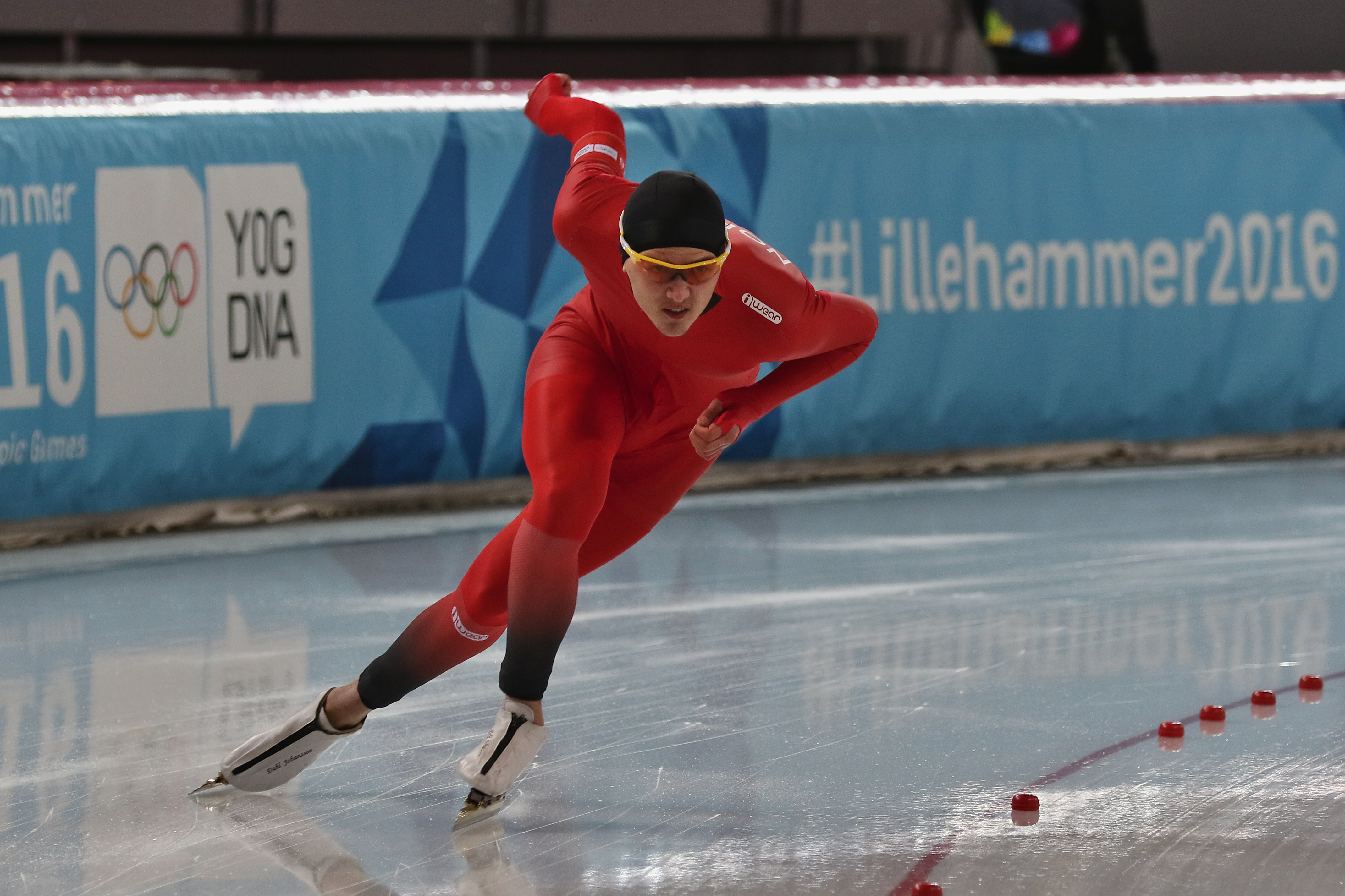 Lillehammer 2016 - Speed skating Men's 500m race 2 - Allan Dahl Johansson